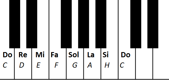 klaviatrura